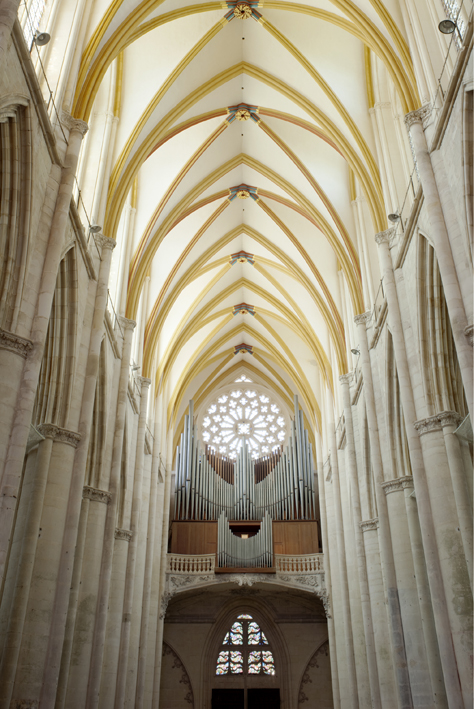 À Toul (Meurthe-et-Moselle, France), dans la cathédrale St Étienne, orgue Curt Schwenkedel, de style néoclassique, ayant remplacé en 1963 l'instrument de Nicolas Dupont de 1755, détruit par un incendie en 1940.